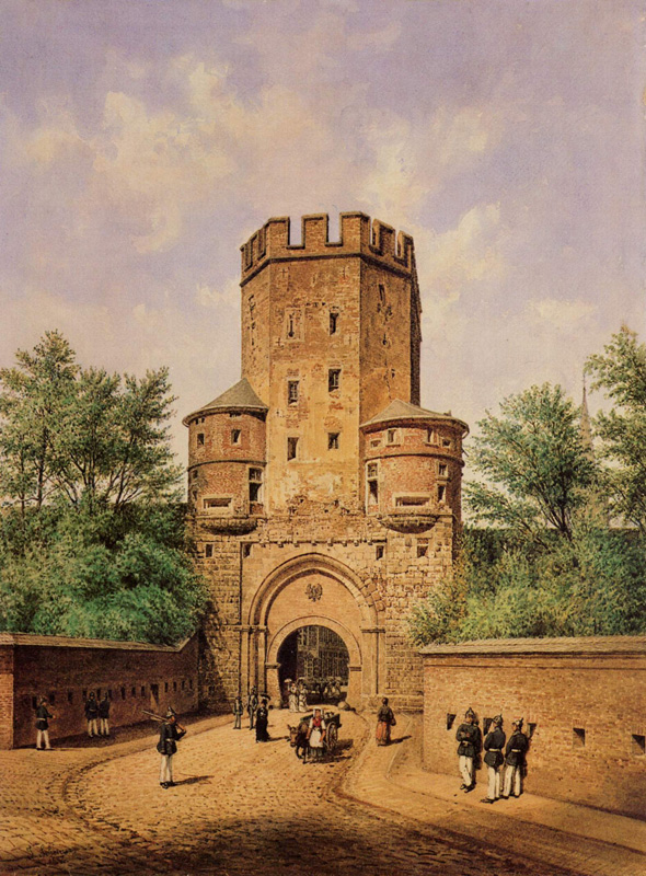 Köln Severinstorburg Feldseite